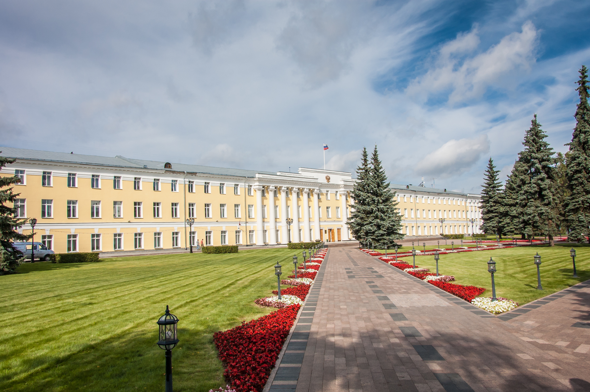 Здание Присутственных мест; здесь в 1887 году родился летчик Нестеров П.Н.: Кремль, Минина и Пожарского площадь, Нижний Новгород, Нижегородская область